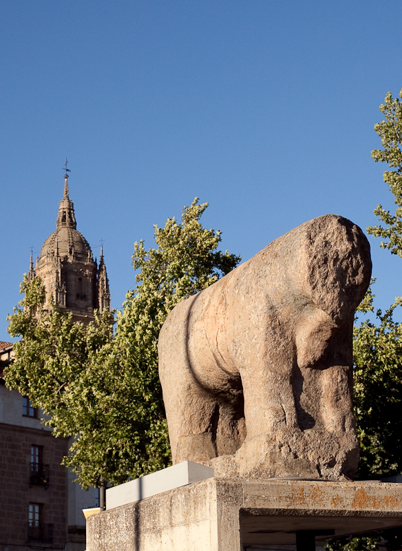 Verraco de piedra en el puente romano de Salamanca